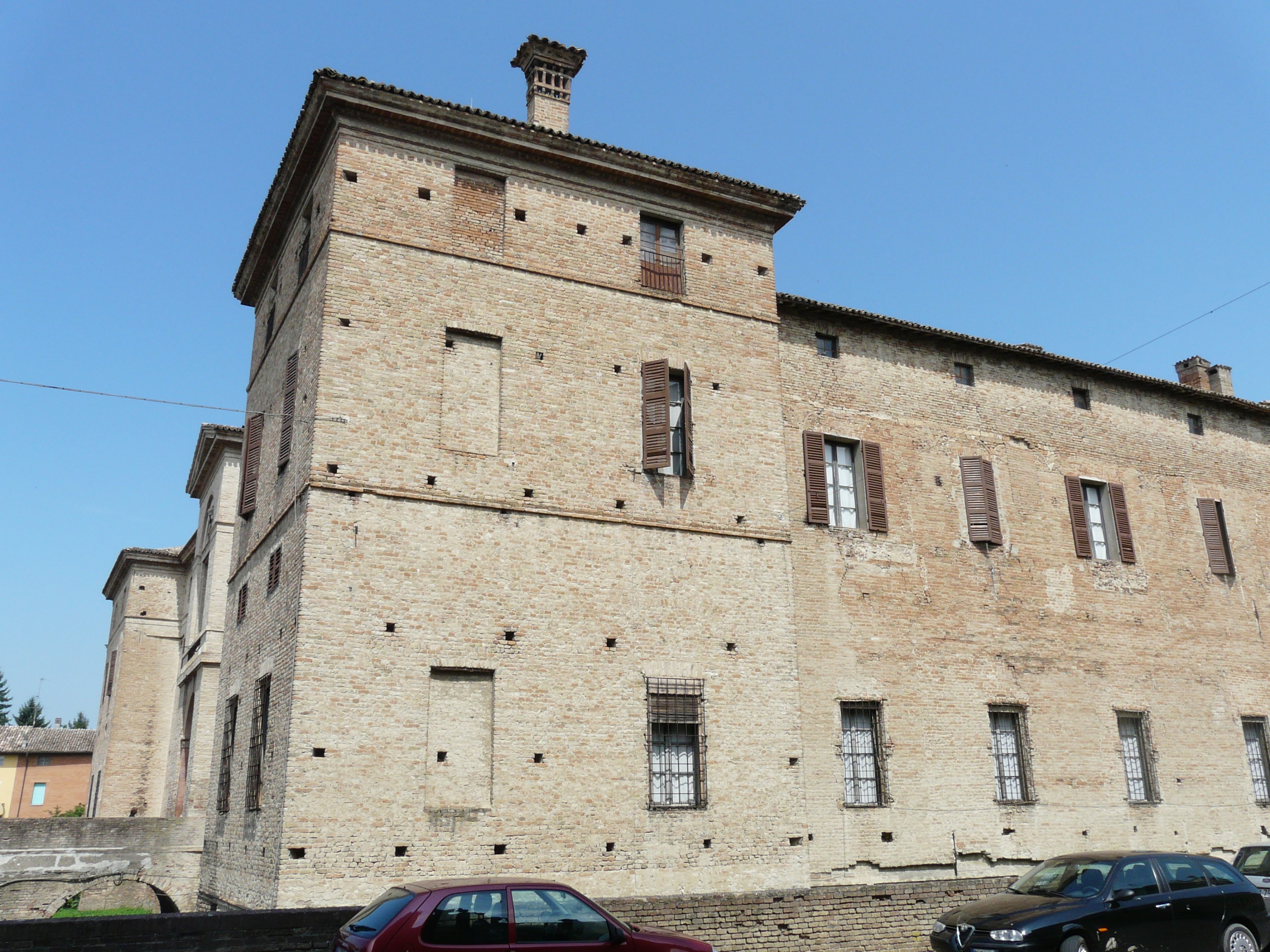 Rocca Meli Lupi, Soragna, Emilia-Romagna, Italia.